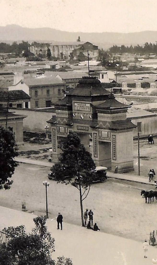 Arco conmemorativo de la Independencia de Centroamérica en 1923.